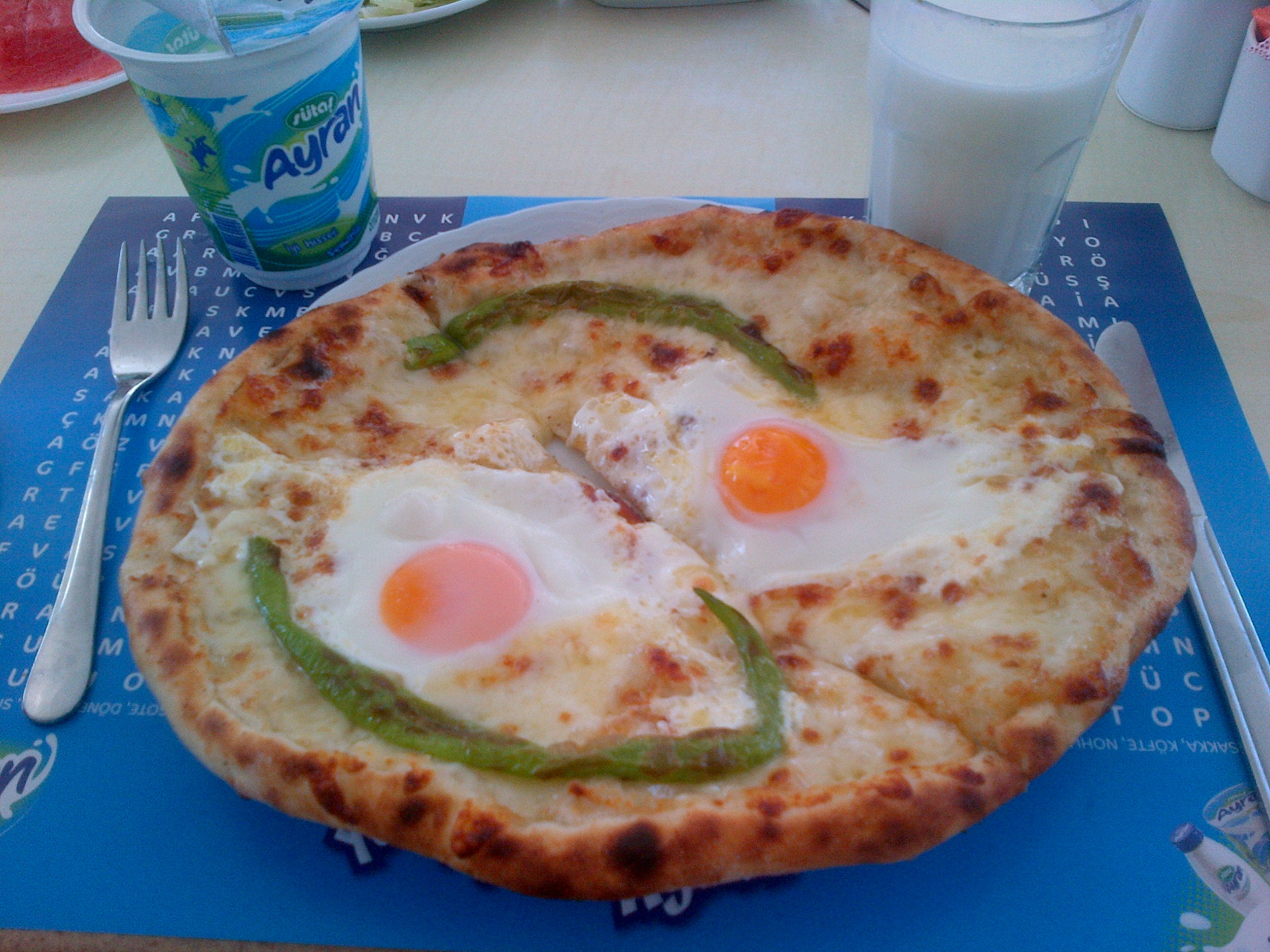 Karadeniz pidesi - ayran dos buenos aliados.